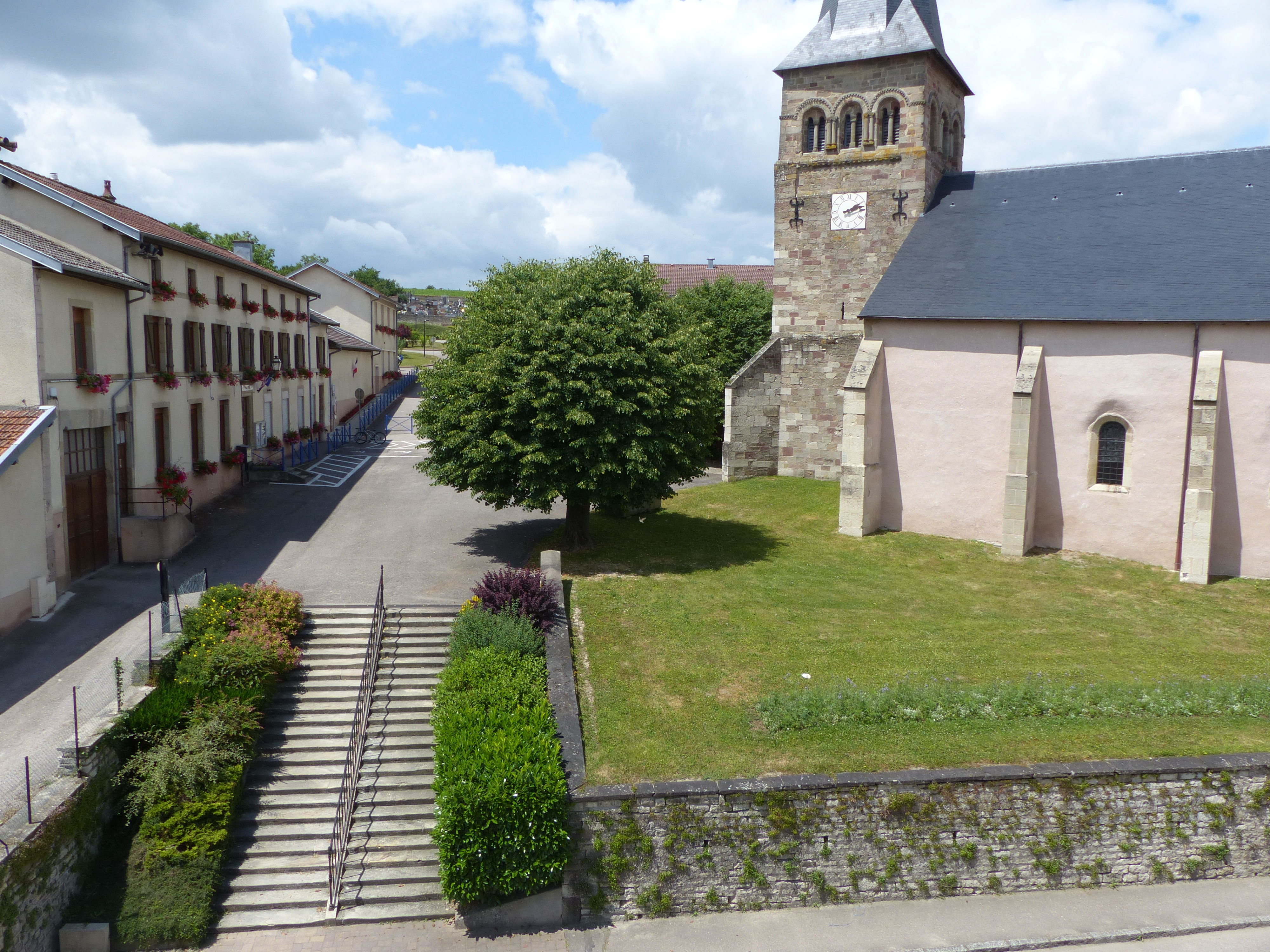 Montée d'escalier menant à la Mairie et à l'église